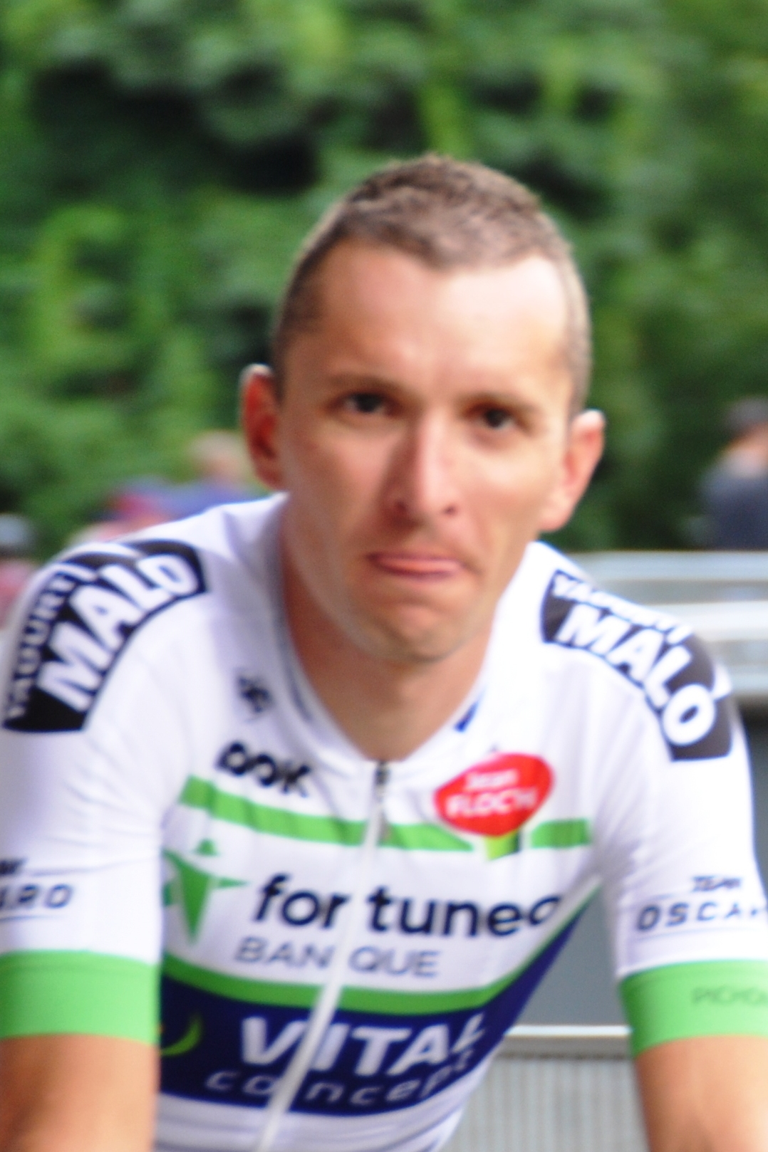 Laurent Pichon, französischer Radrennfahrer